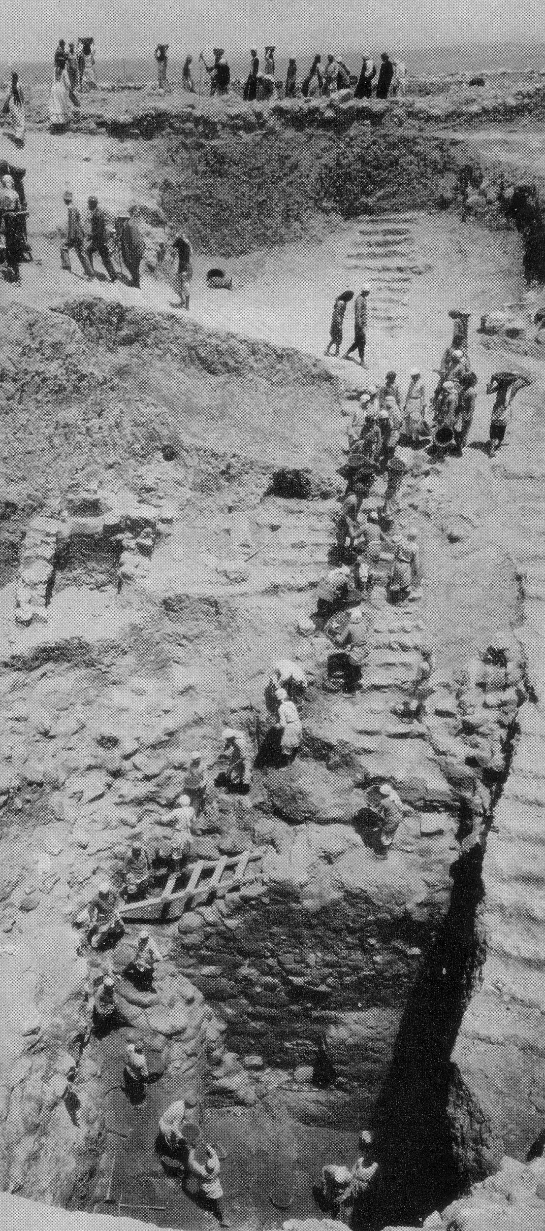 חפירות בתל מגידו, מערכת מים